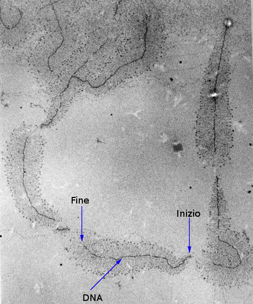 elektronenmikroskopische Aufnahme ribosomaler Transkriptionseinheiten von Chrironumus pallidivitatus. Vergrößerung: 40.000x